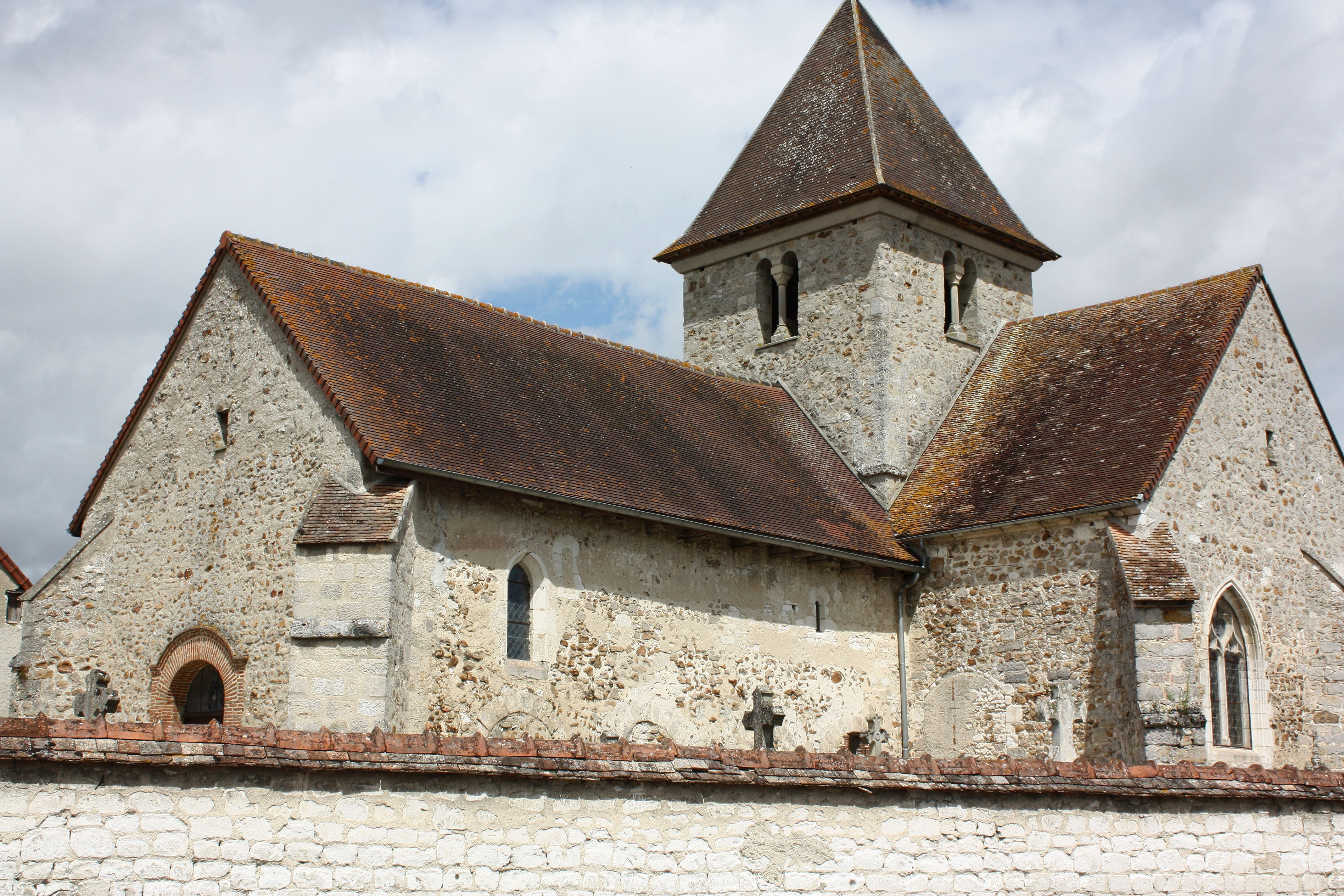 Granges-sur-Aube - Eglise Saint-Maurice Vue générale au Sud-Ouest